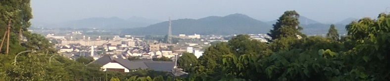 兵庫県三木市本町遠景